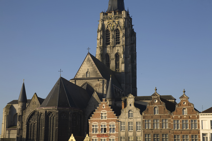 Sint-Walburgakerk, Oudenaarde, Belgium